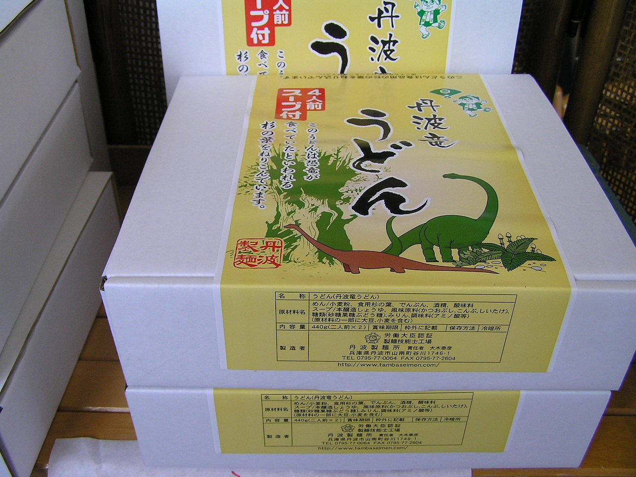 丹波竜うどん 丹波製麺所